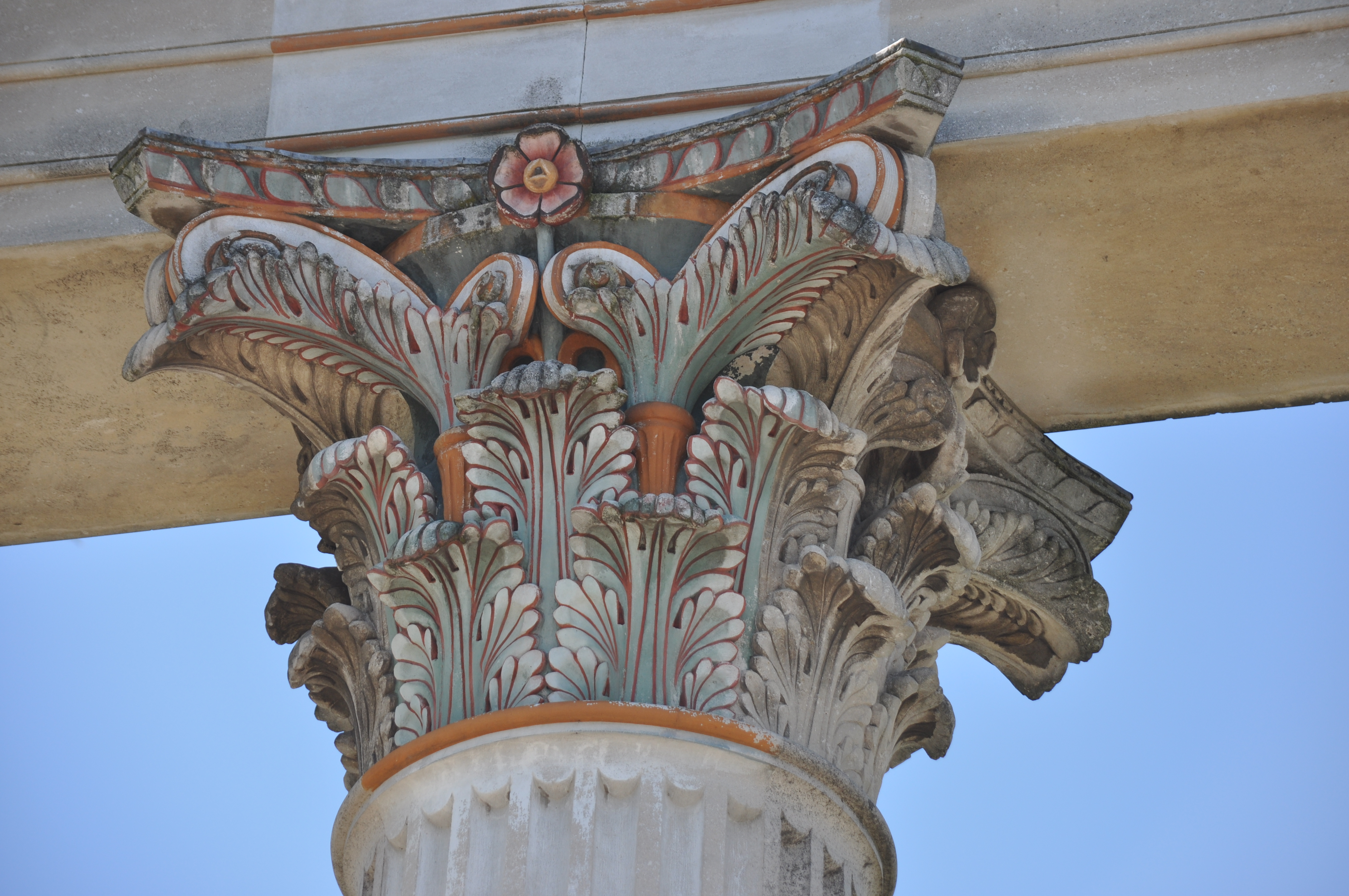 Detalle del capitel de orden corintio en el Templo del Puerto, reconstruido en base a los fundamentos y a los hallazgos fragmentarios